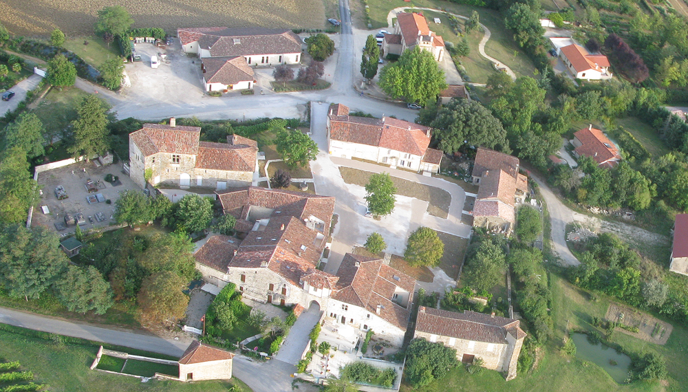 Le village de Maignaut-Tauzia (Gers)